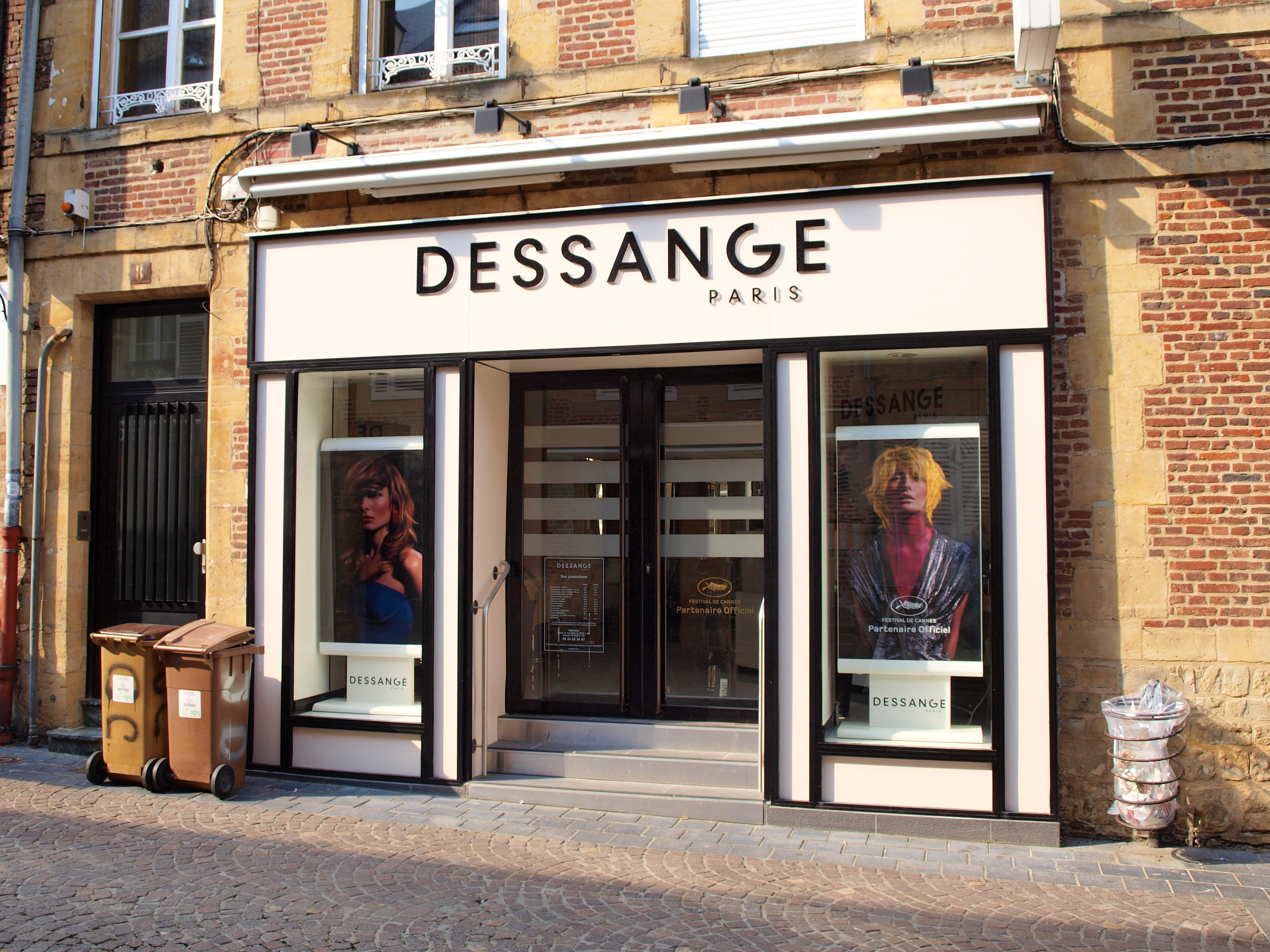 Commerce de Charleville-Mézières (Ardennes, France)